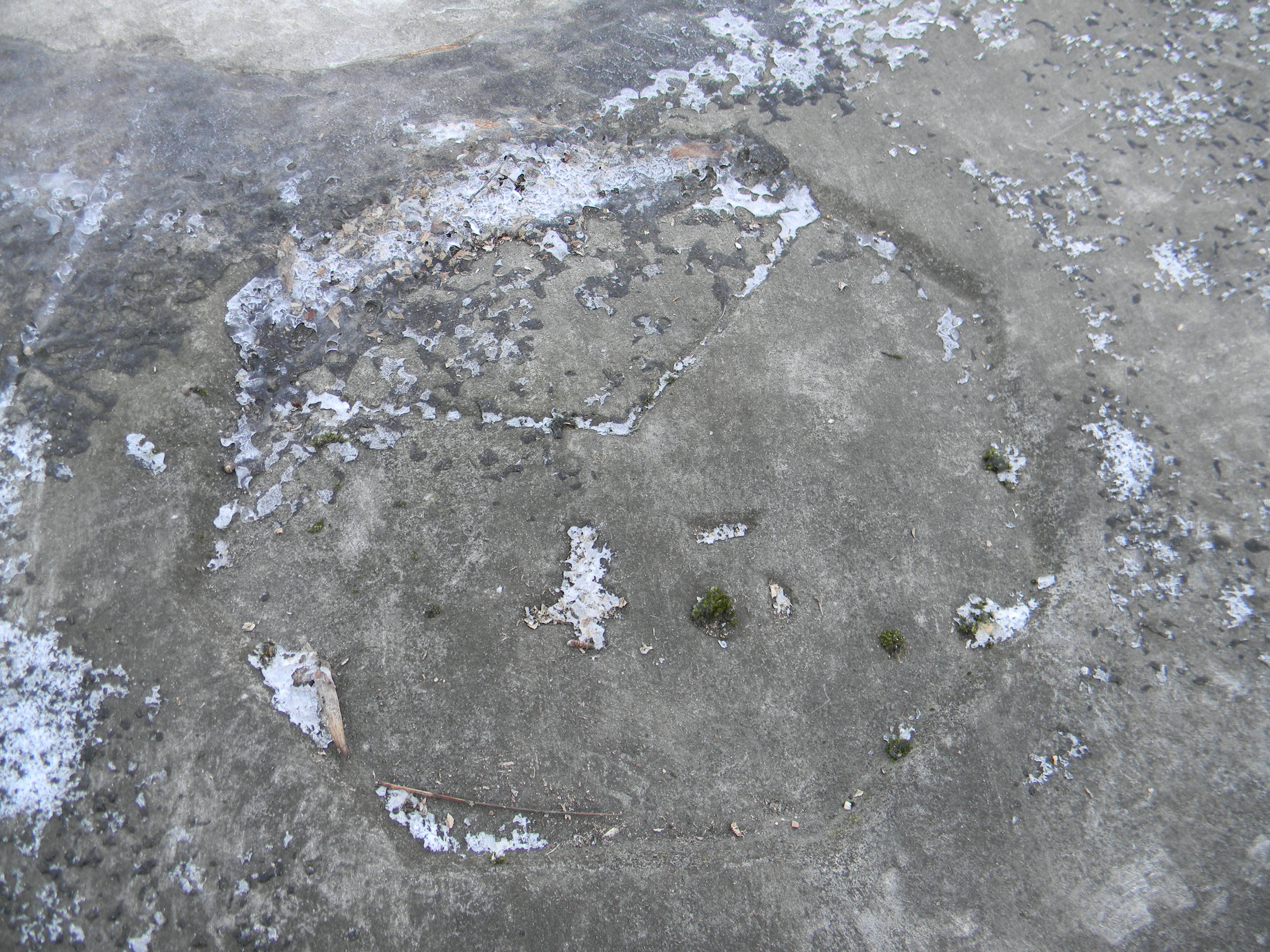 Borne de propriété militaire n°43 du Fort de Vaise.